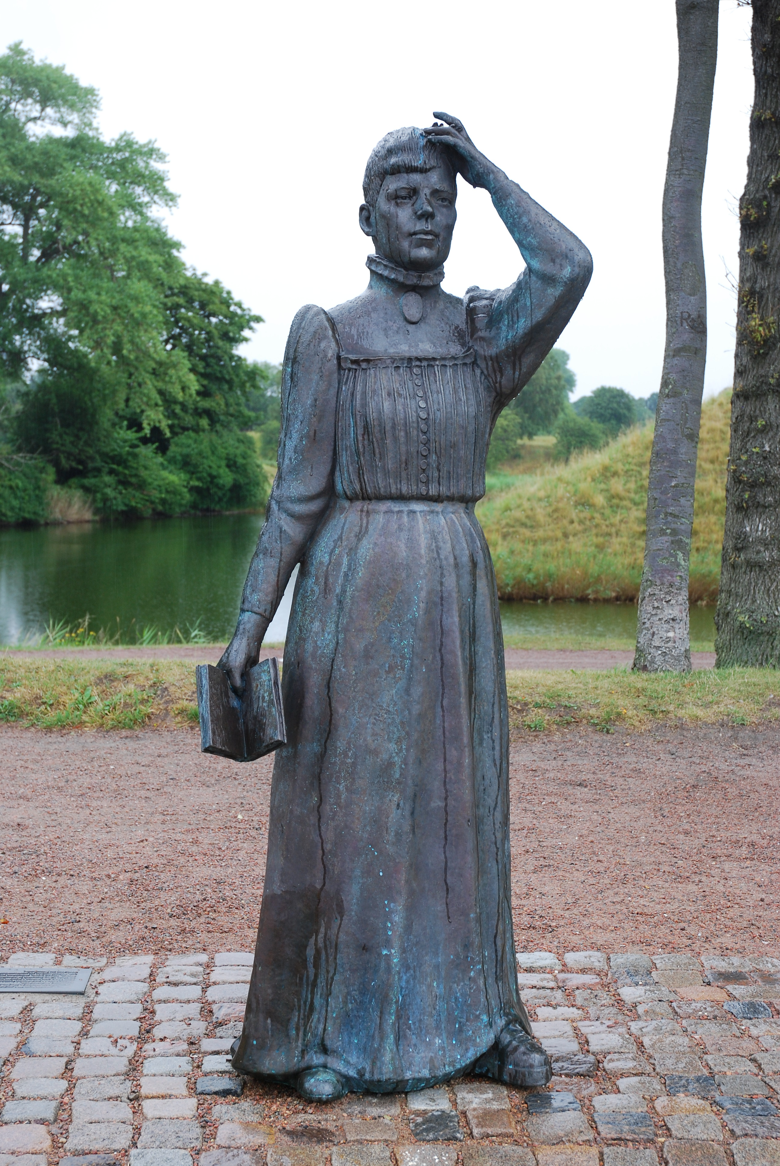 Jonas Högström´s statue of Swedish author Selma Lagerlöf, Nordkap, Landskrona. Sweden